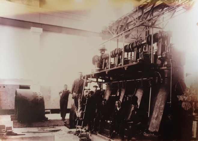 בניית תחנת הכוח הישנה בתל אביב